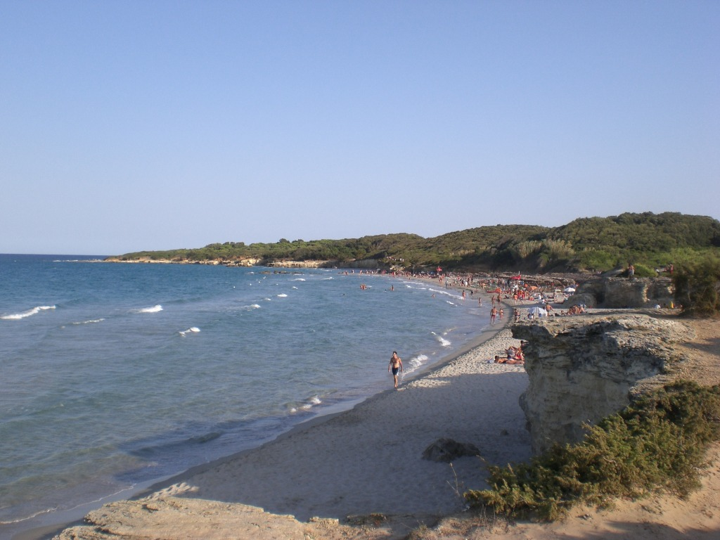 panorama sud della baia